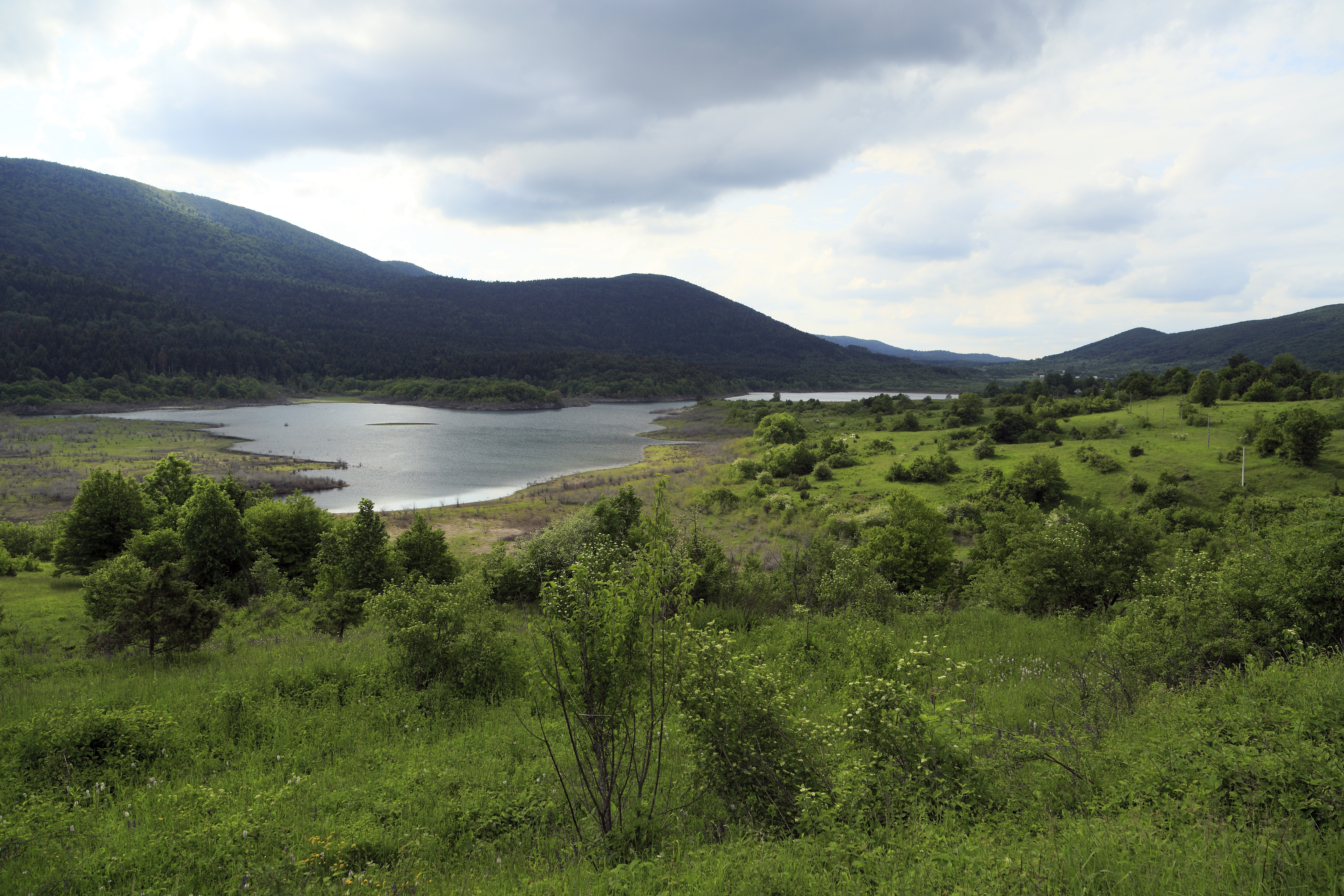 Karstsee bei Blata zwischen Plaški und Lička Jesenica ohne oberirdischen Abfluss, seine Größe schwankt je nach Niederschlagsmenge stark.